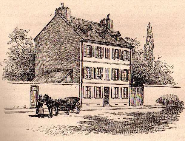 La Maison des missions de la Société des Missions Évangéliques de Paris (SMEP) située 21 rue Franklin à Passy.